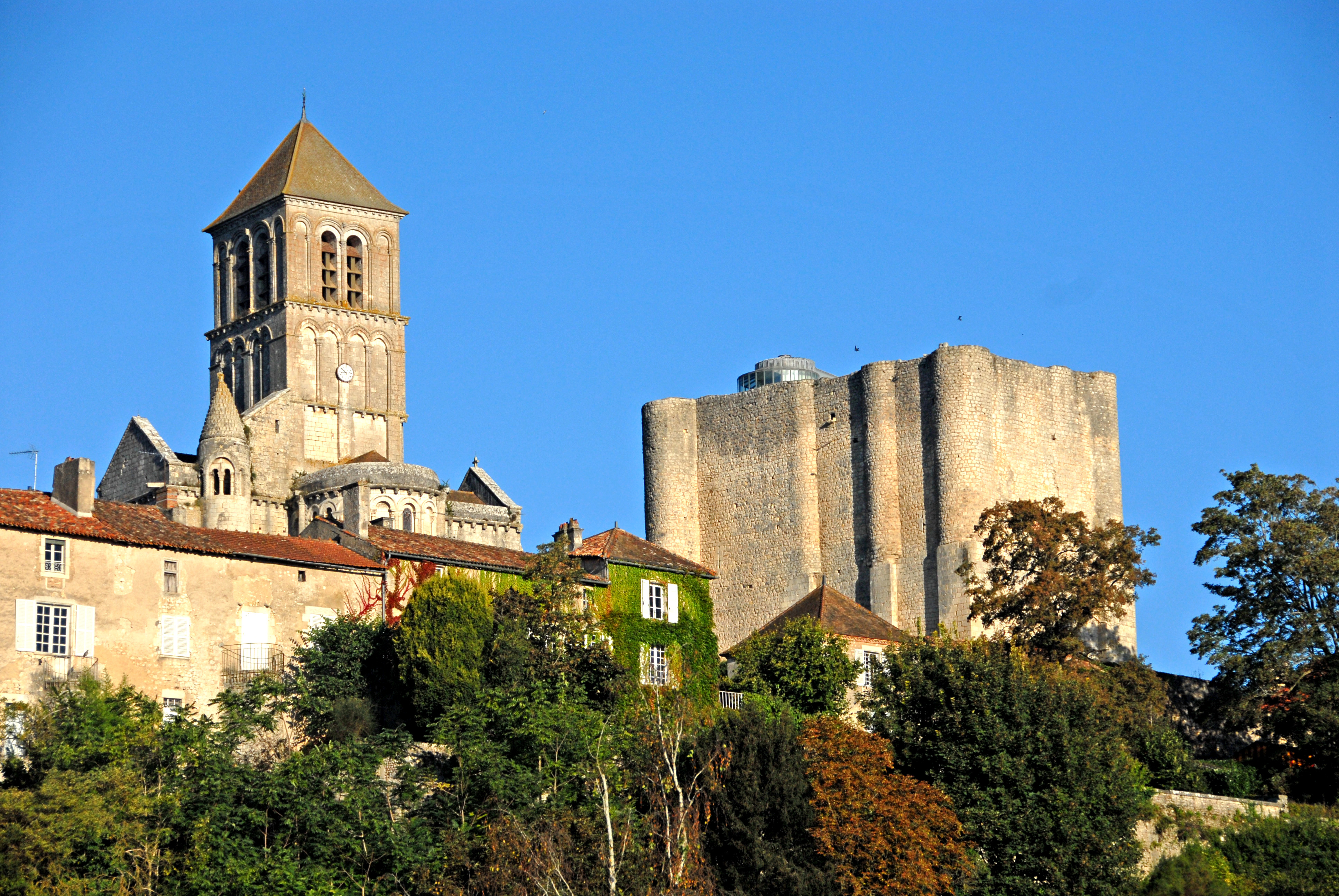 St.-Pierre Chauvigny, Kirchturm überragt den Donjon